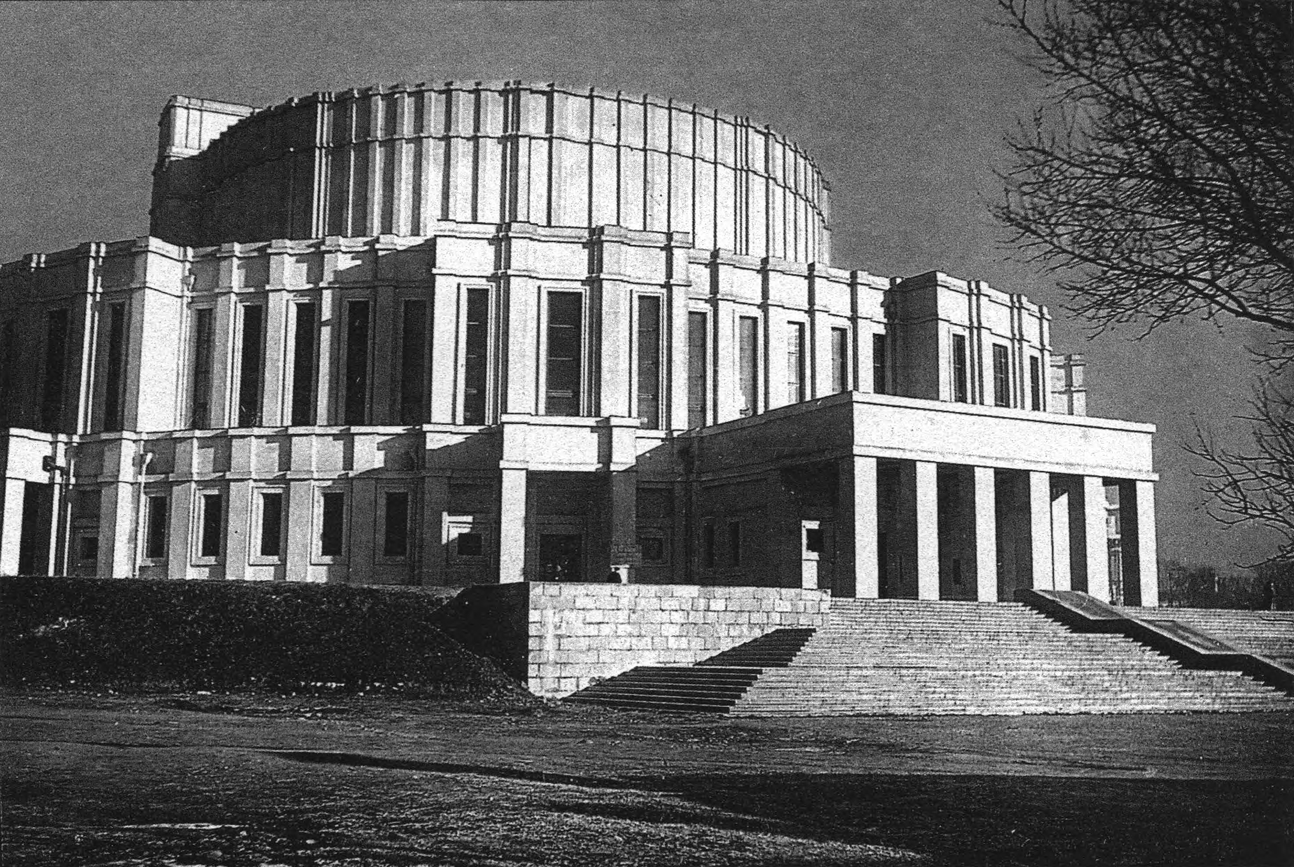 Беларуская (тарашкевіца): Менск (Miensk), Траецкая гара (Trajeckaja hara). Опэрны тэатар